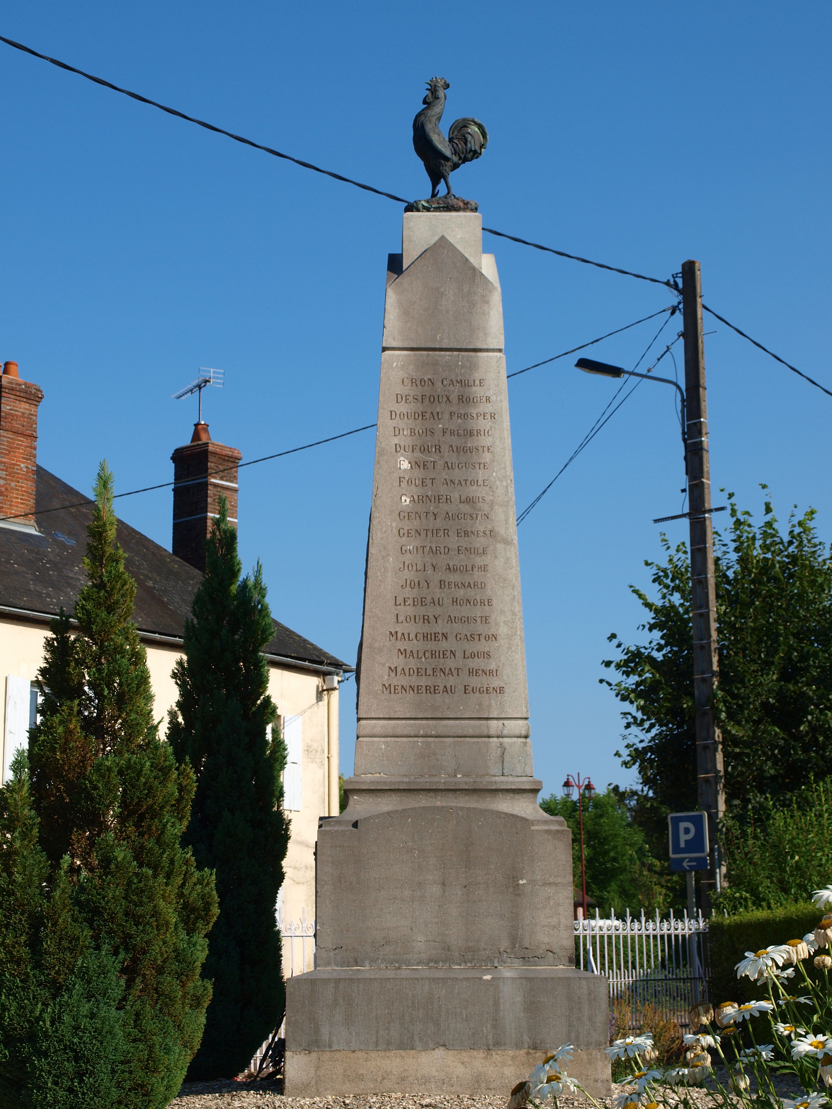 Mézilles (Yonne, France); monument aux morts